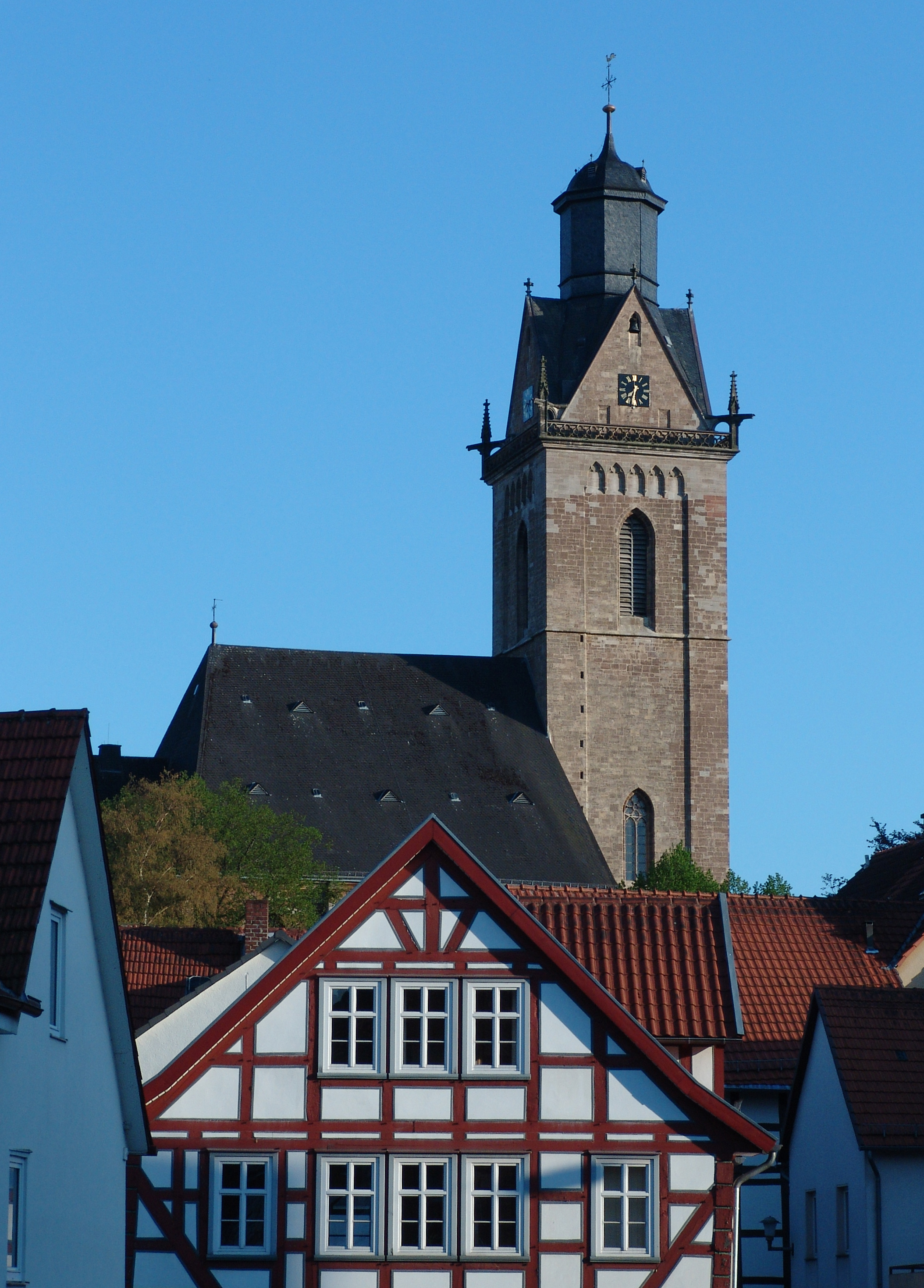 Korbach-St. Kilian